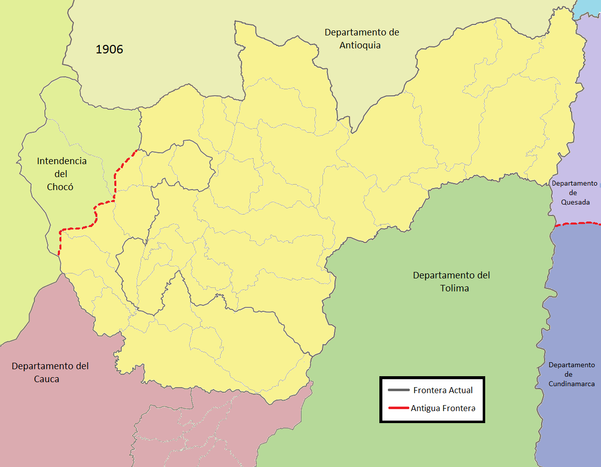 Mapa histórico de caldas en 1906